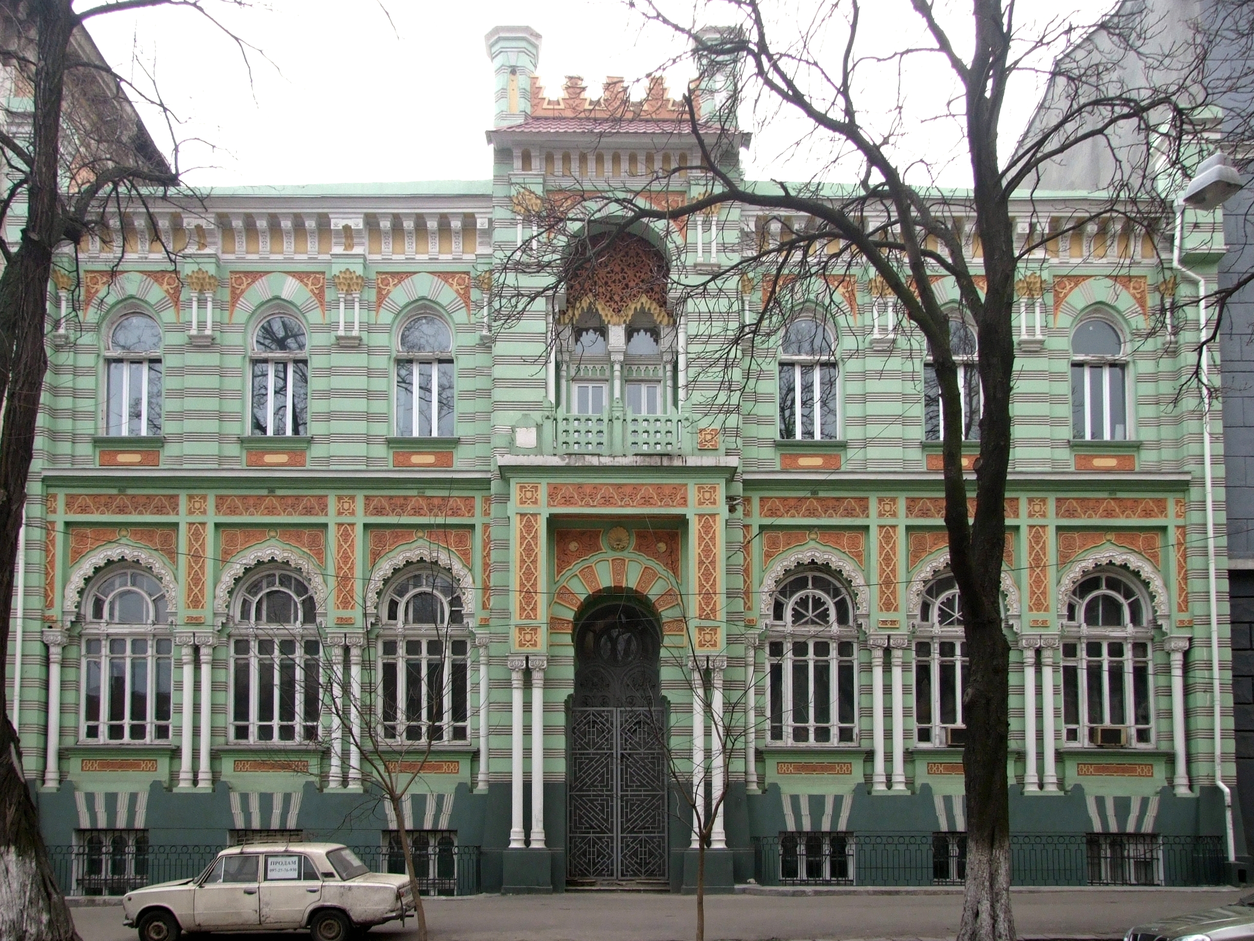 Будівля водолікарні докторів Абеля і Валіха (гідропатичний санаторій А.Б.Гінесіна), 1901 р.